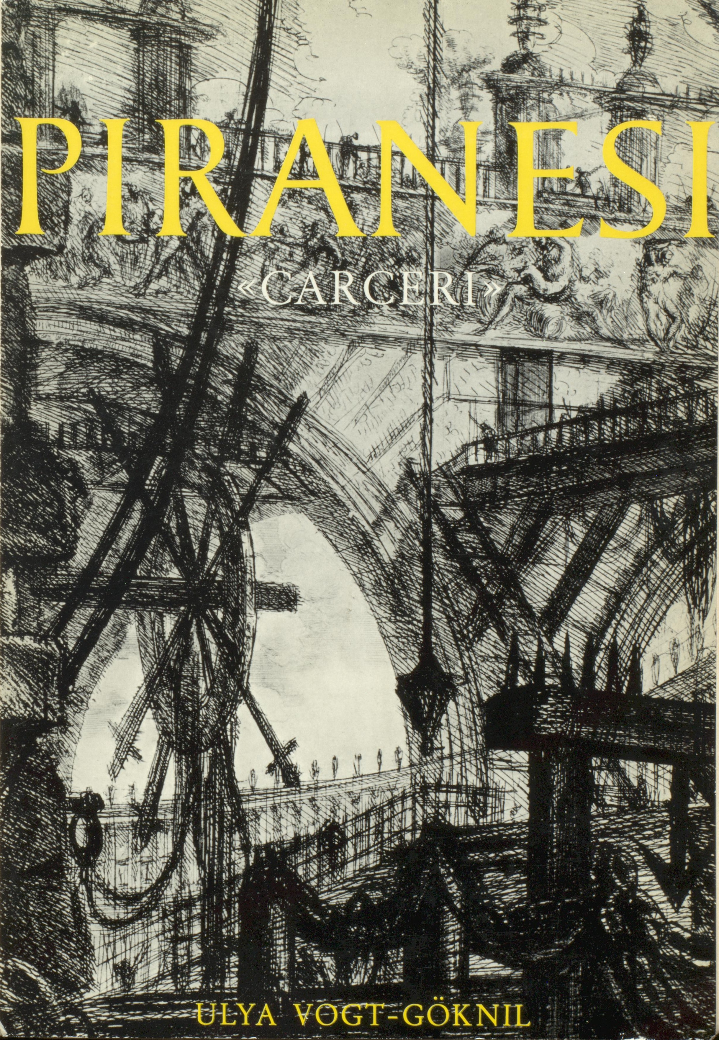 Bucheinband von; Ulya Vogt-Göknil: Giovanni Battista Piranesi «Carceri». Zürich : Origo, 1958 unter Verwendung von Giovanni Battista Piranesi Le Carceri d'Invenzione Tafel 4 Zweiter Zustand 1761 Ausschnitt